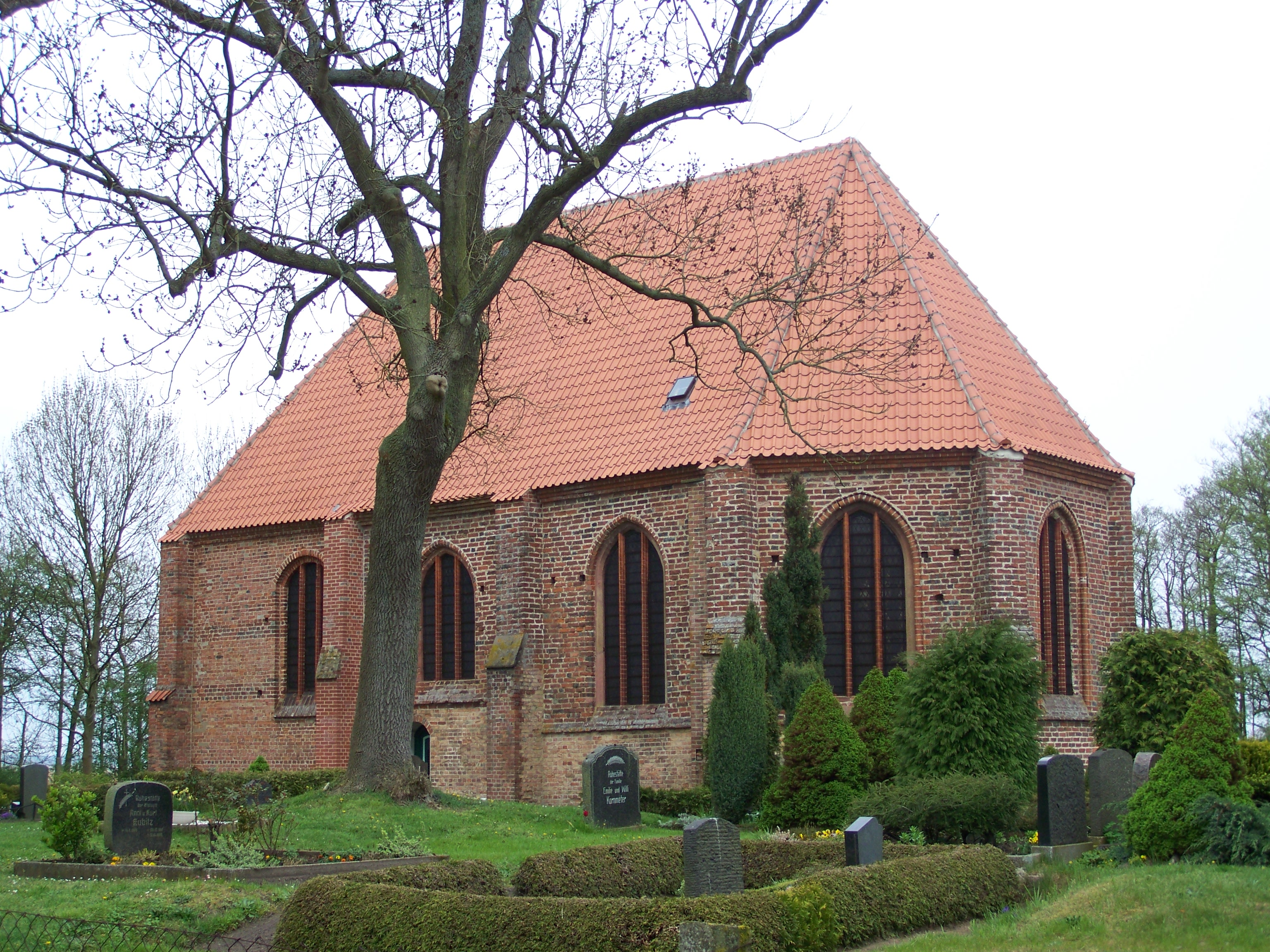 Kirche Bodstedt (2008-05-01)